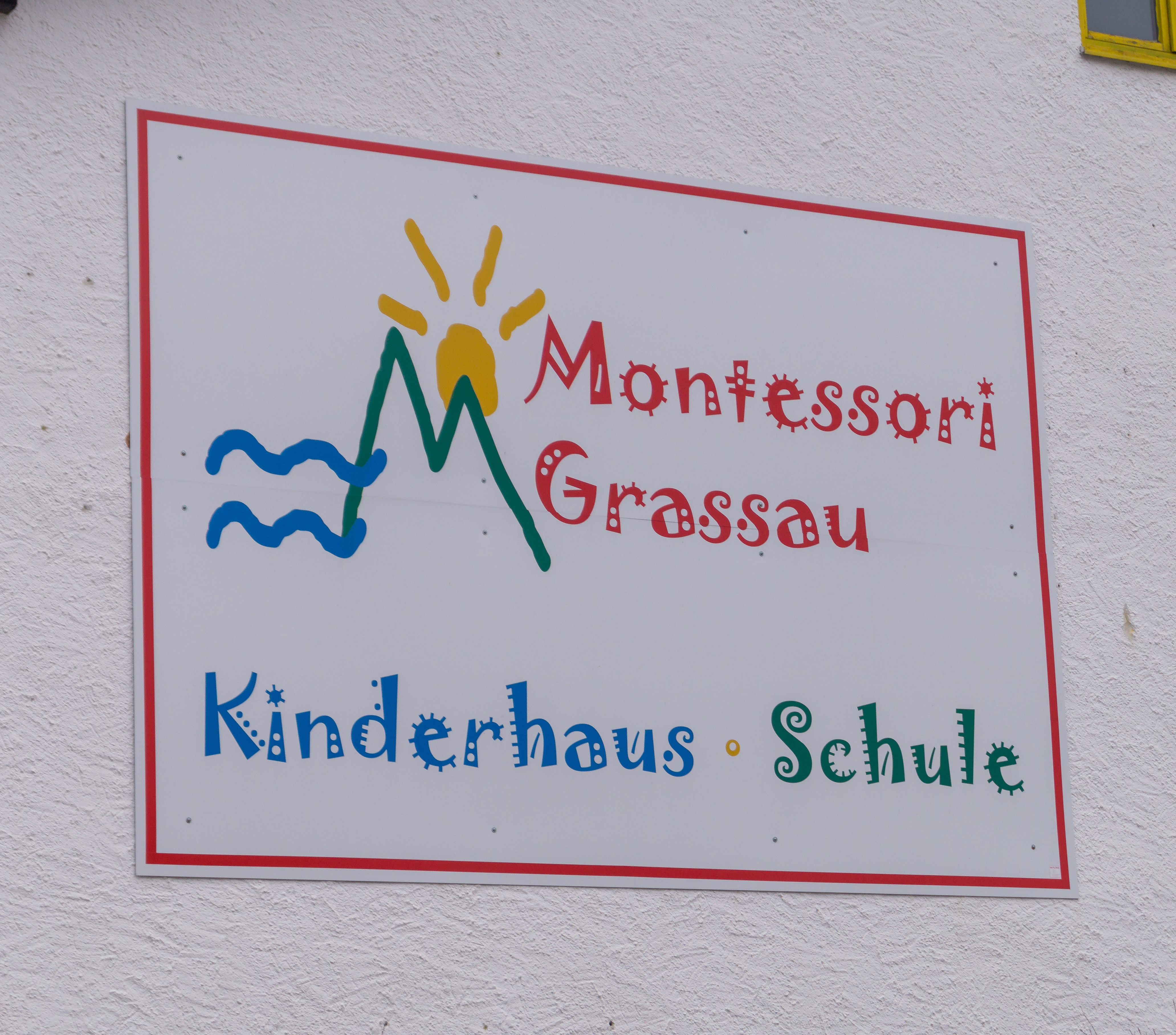 Schild an der Montessorischule Grassau:„Montessori GrassauKinderhaus · Schule“